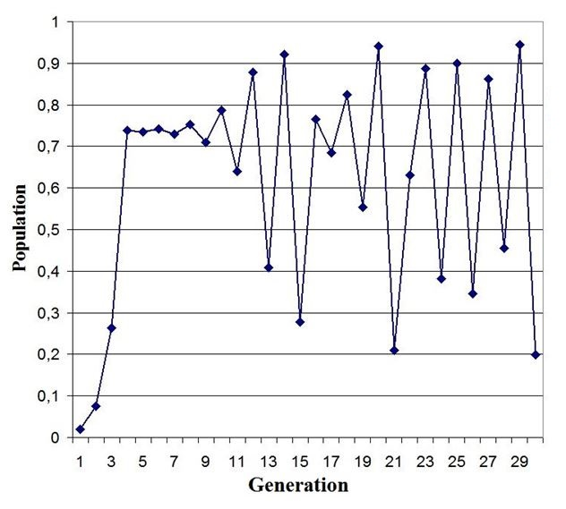 Die „logistische Kurve“ mit einer Wachstumsrate r = 3,81 verläuft chaotisch.